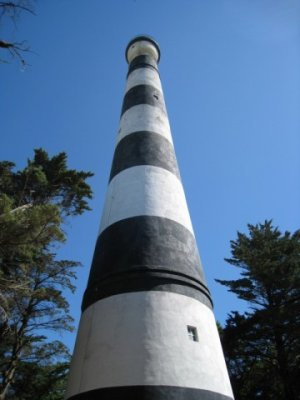 Faro Qurandí, Mar de la Plata, provincia de Buenos Aires, Argentina